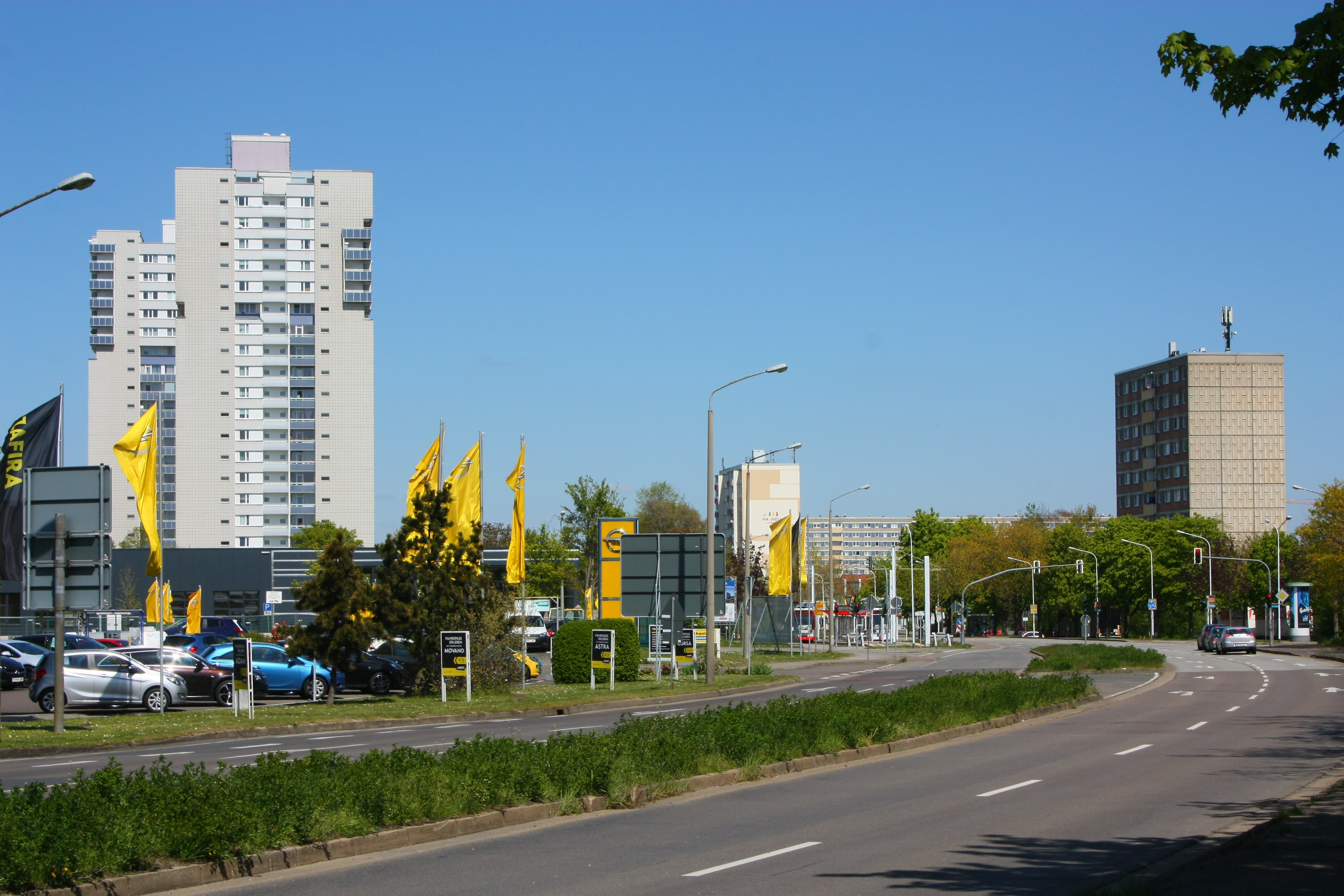 Blick von der Weststraße in Halle-Neustadt nach Norden